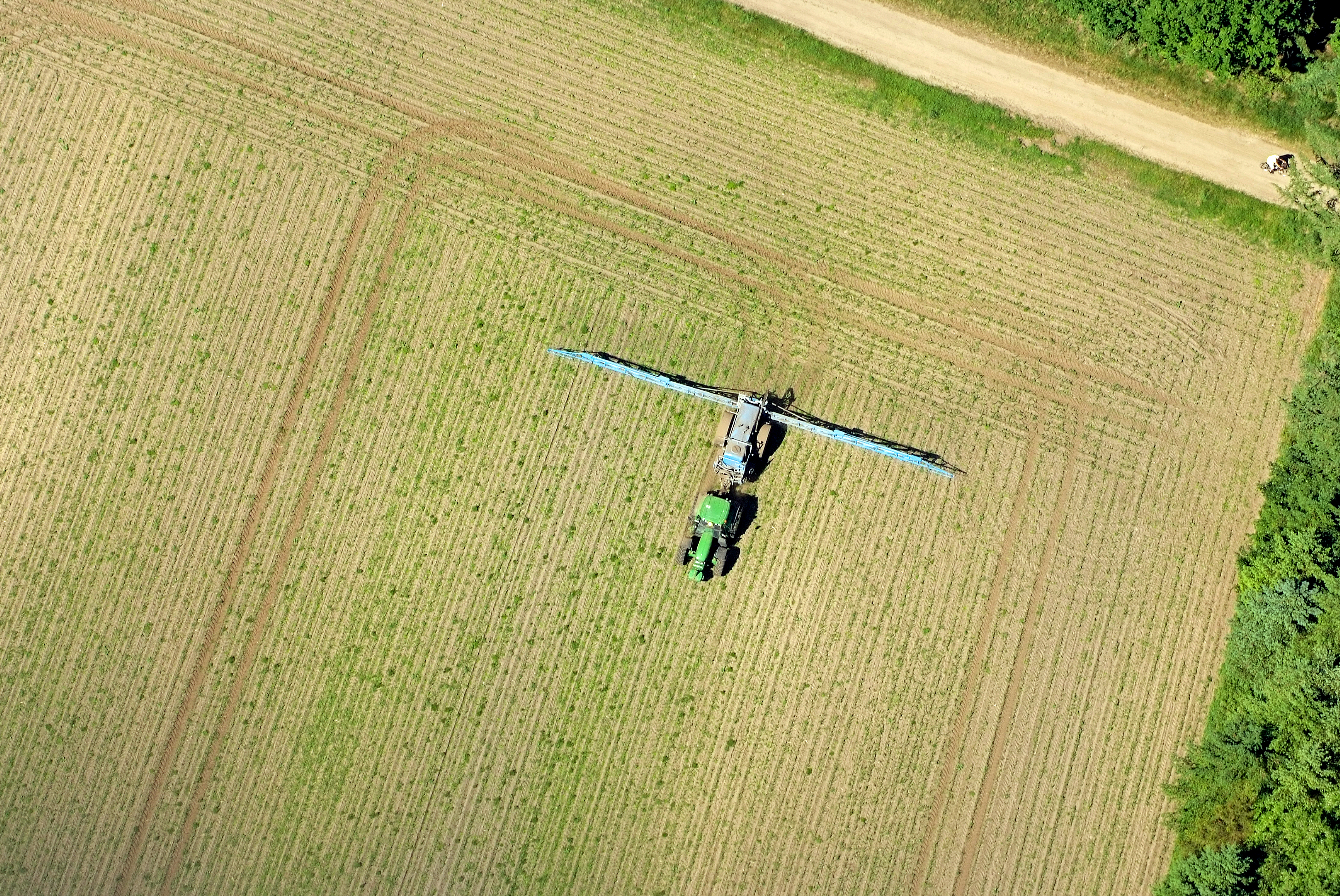 Fotoflug vom Flugplatz Nordholz-Spieka über Cuxhaven und Wilhelmshaven